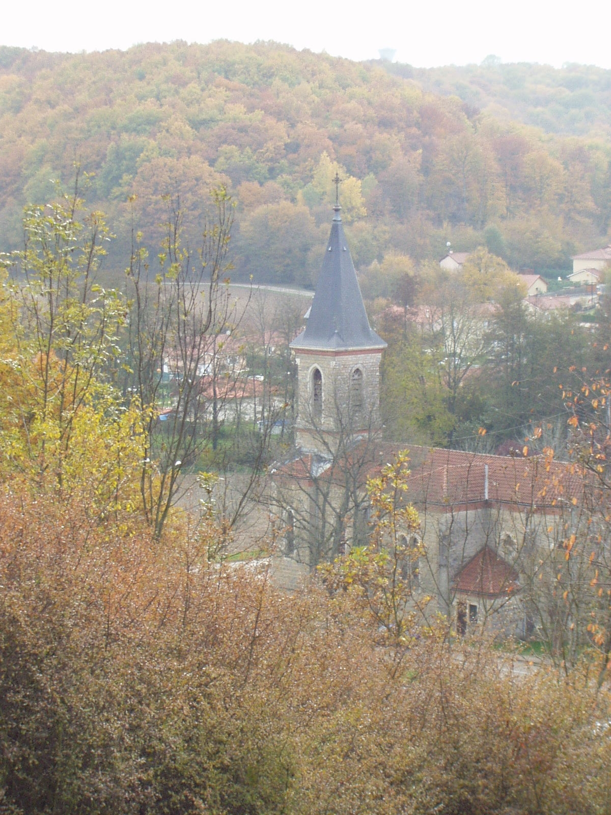 Vue du village de Sainte-Croix dans l'Ain.